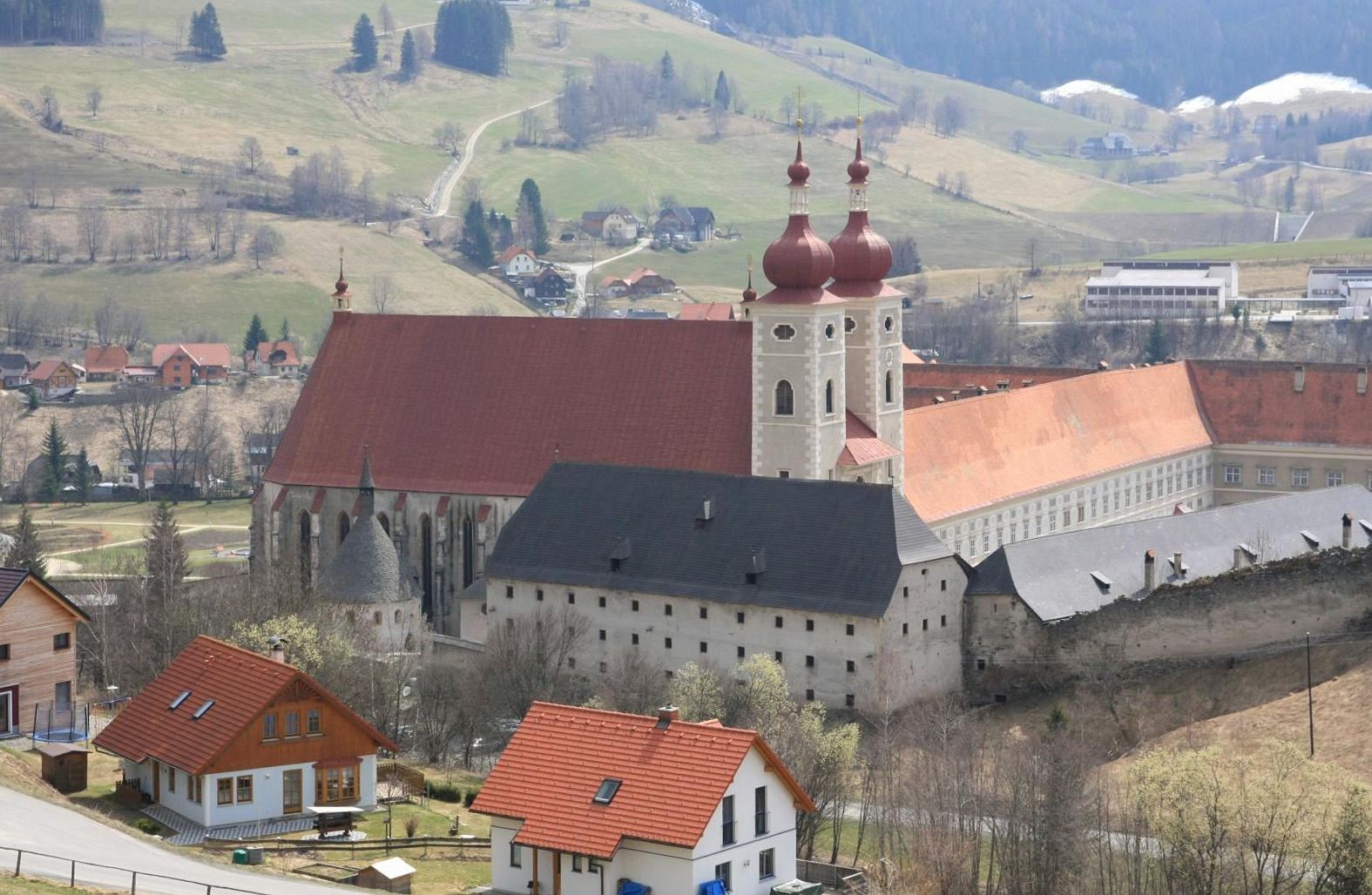 Stift St. Lambrecht